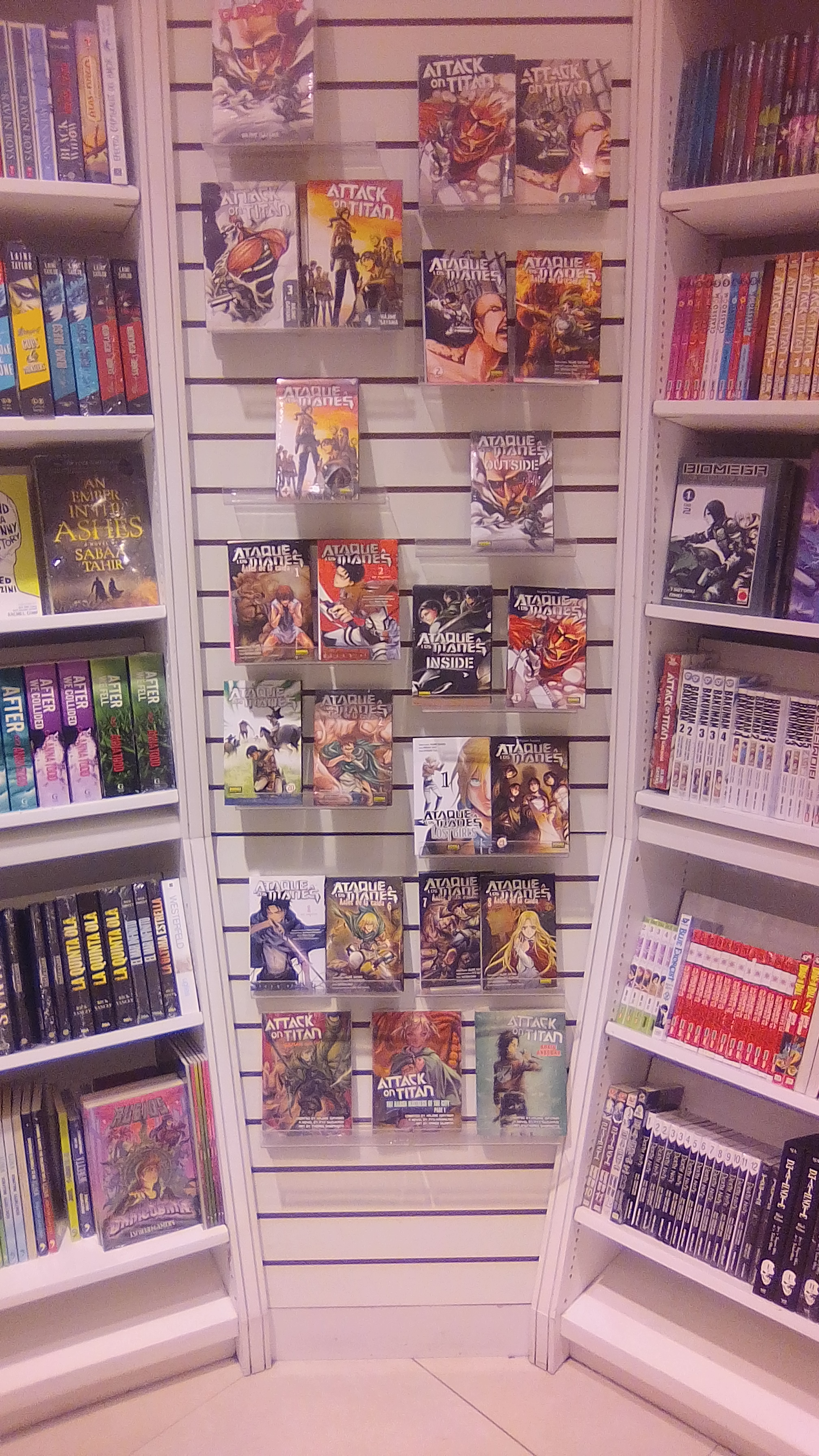 Tomos del manga de Shingeki no Kyojin, sus spin-off, sus novelas, y sus guías traducidos al español y publicados por la editorial Norma bajo el titulo «Ataque a los Titanes», y que se ubican en la esquina de una librería. En la parte superior, se pueden observar algunos tomos y guías en inglés publicados por Kodansha USA.